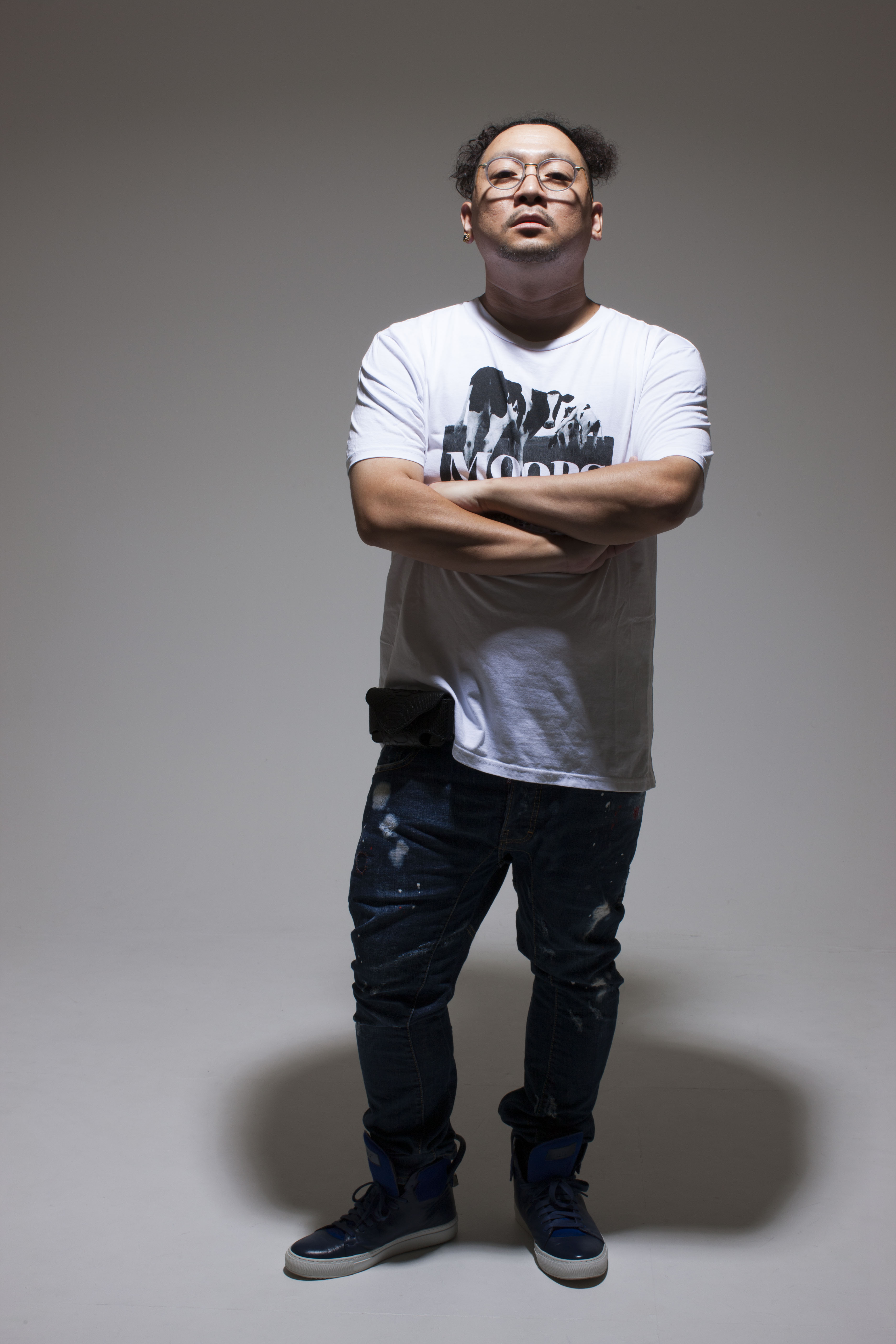 ディプライブ(岡添明)